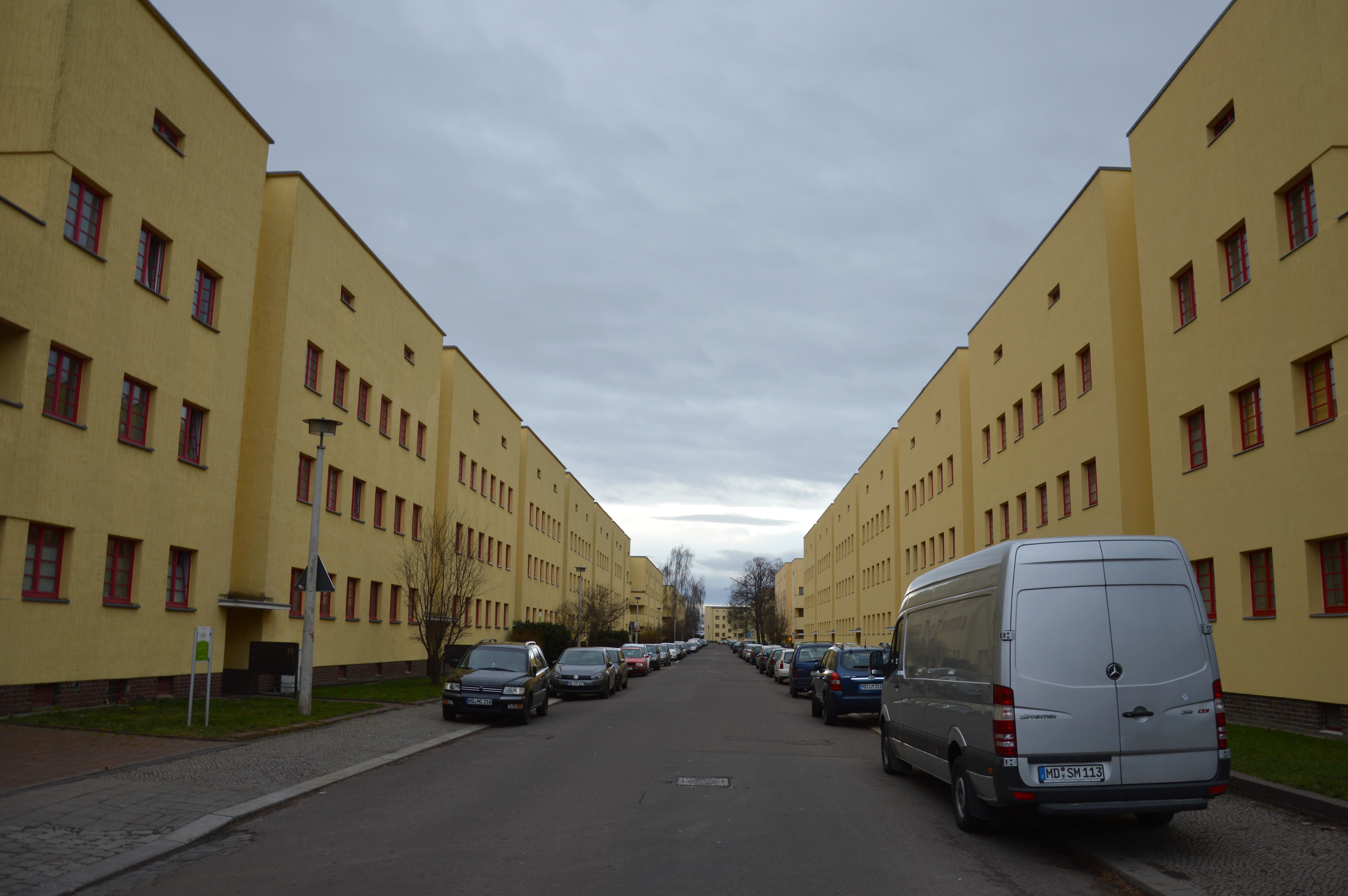 Flechtinger Straße in Magdeburg